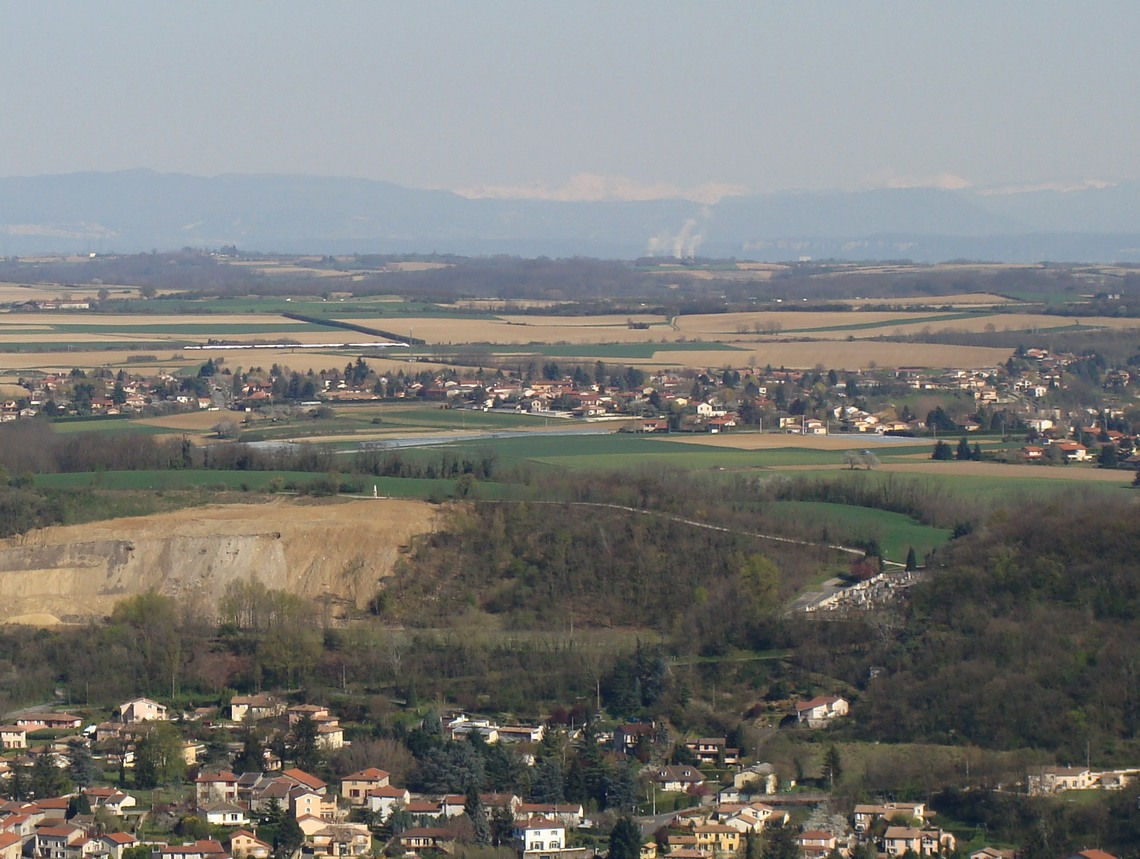 Le plateau de la Dombes vu depuis le crêt d'Albigny. Au premier plan, Fleurieu ; sur la plateau à gauche un TGV sur la ligne à grande vitesse Paris - Sud-est ; au fond à gauche le massif du Bugey, au centre le Mont Blanc ; en avant de celui-ci, les fumées de la centrale nucléaire du Bugey (Saint-Vulbas).